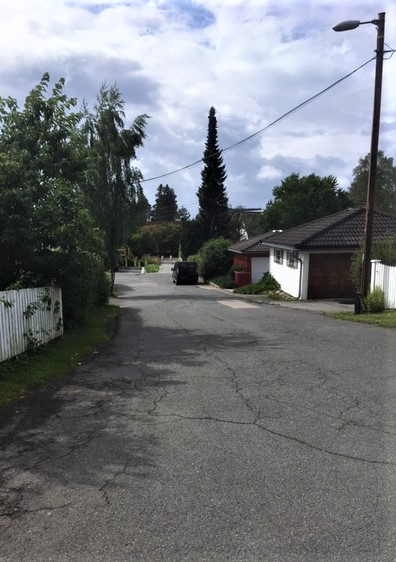 Tyslevkroken Oslo august 2019B